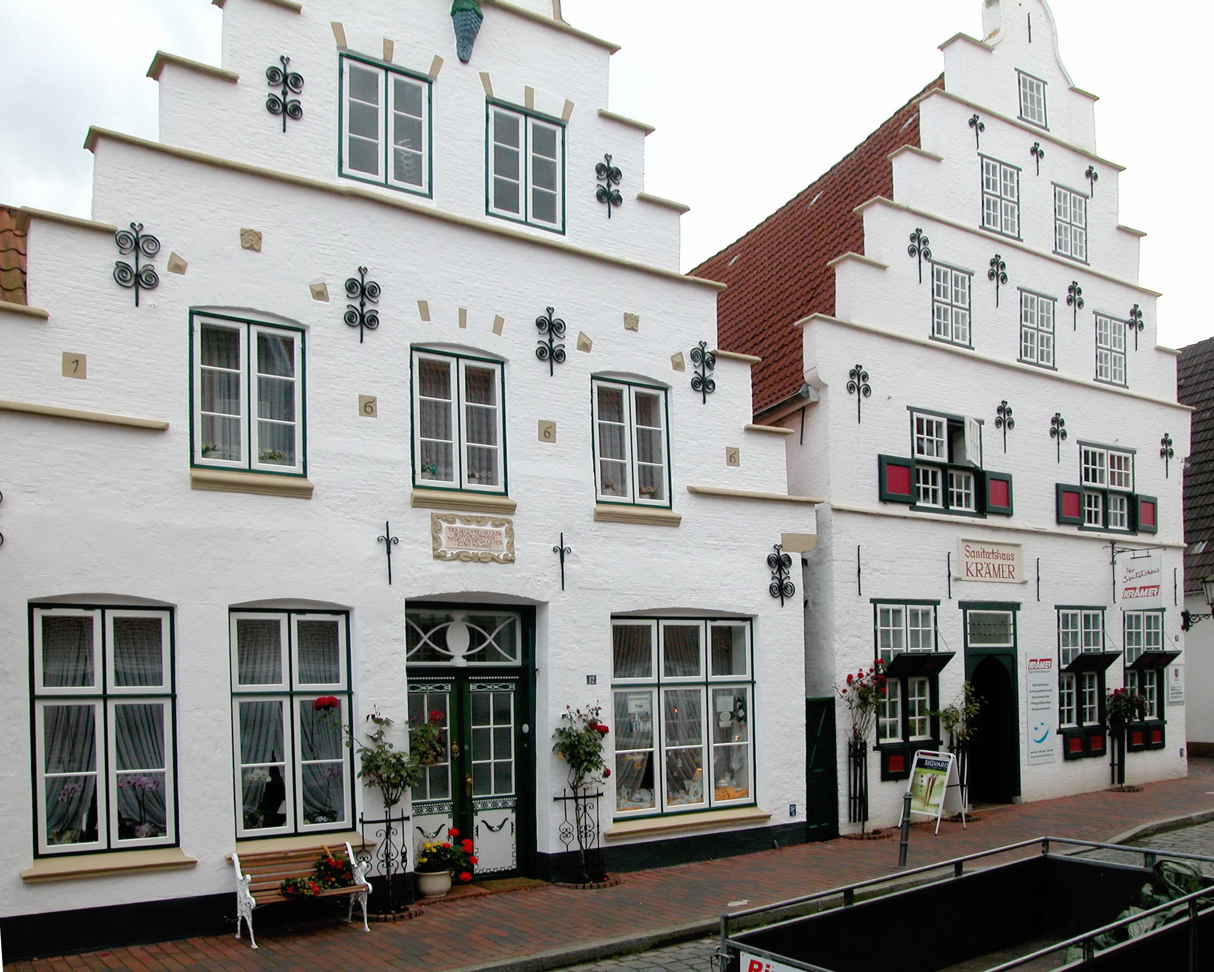 Tönning,_Fassaden aus dem 17. Jahrhundert Standort:54°19′0.3″N 8°56′31.5″E / 54.31675°N 8.942083°E